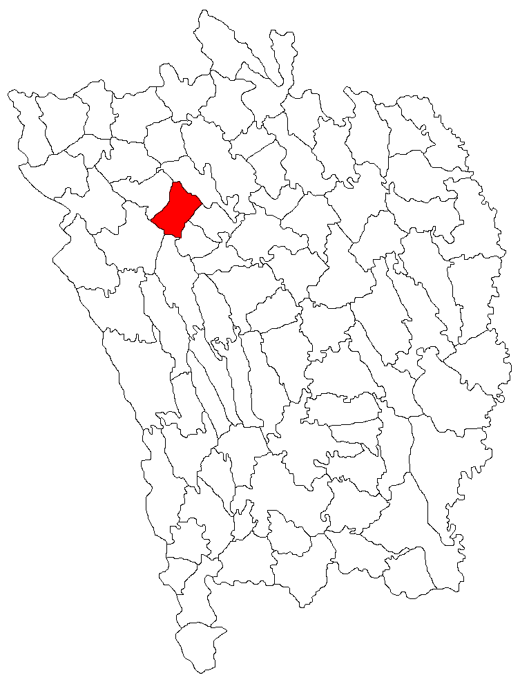 Categorie:Hărţi ale judeţului Vaslui